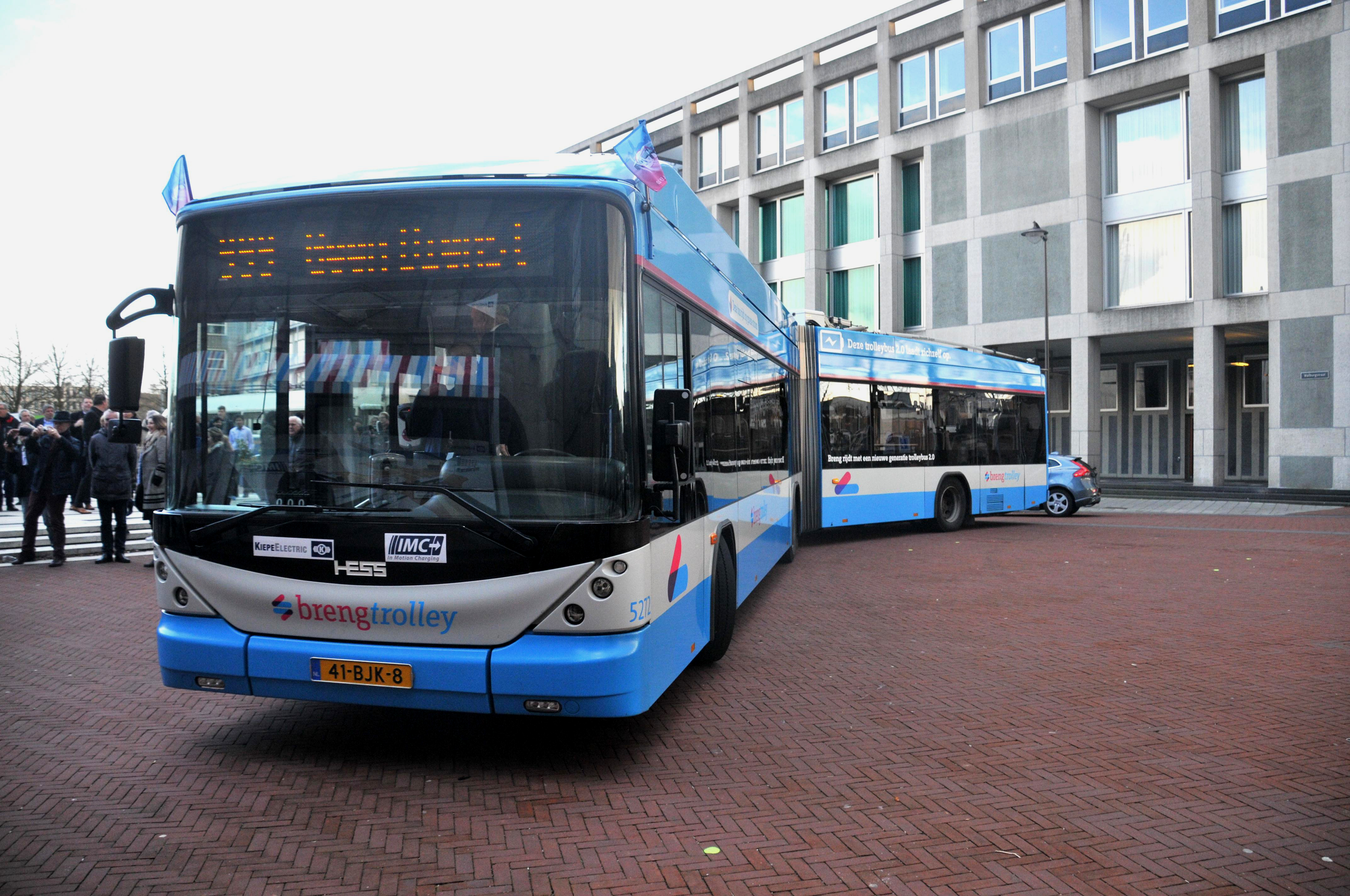 Dit is Trolly 2.0 tijdens de officiële presentatie bij het stadhuis te Arnhem. Het gaat hierbij om Breng bus 5272.